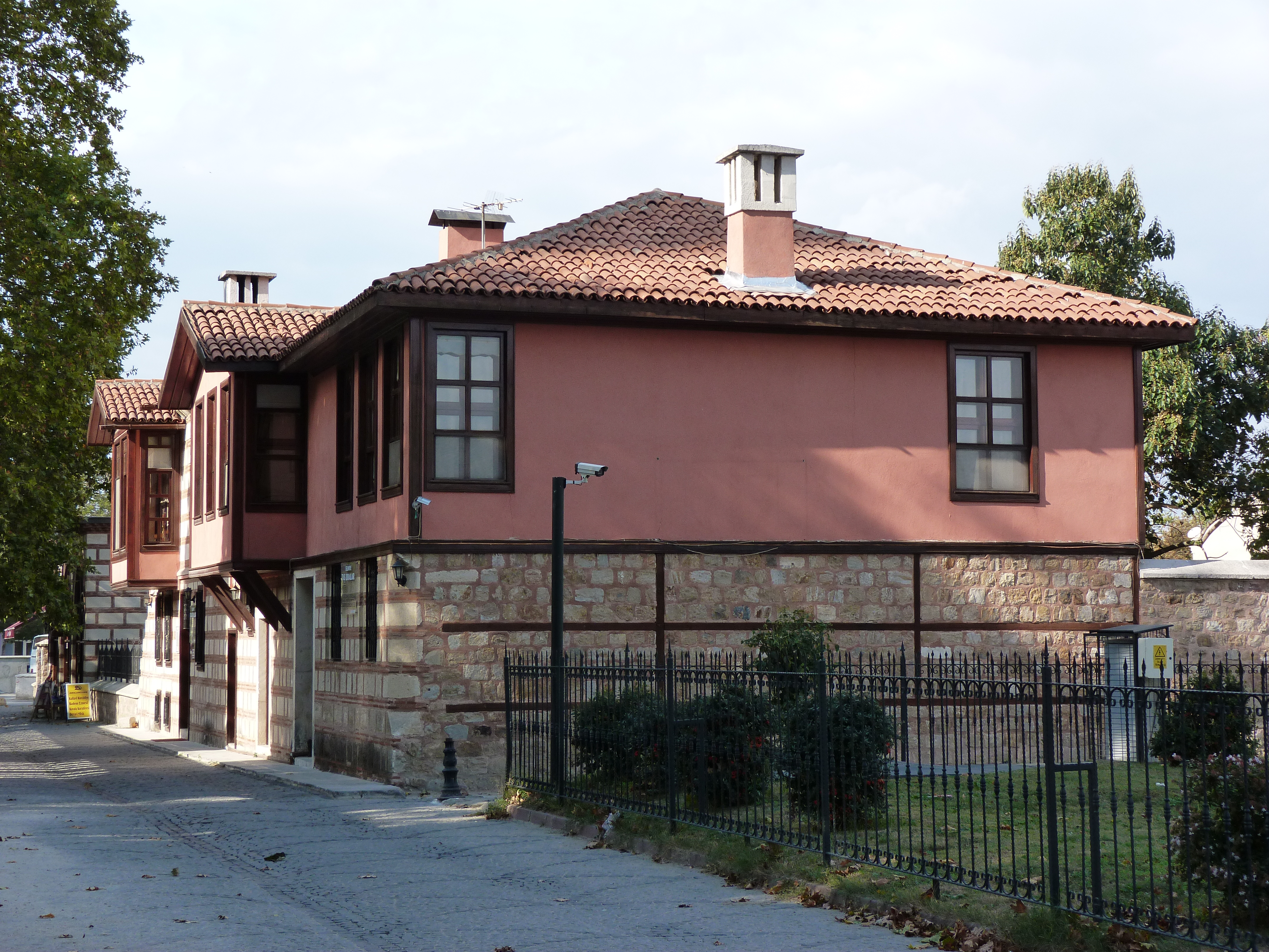 A felvétel 2014. október 22-én kedden készült Edirnében. ©© Derzsi Elekes Andor, Budapest, 2014, A kép egészben, vagy részletekben másolását, bármilyen úton történő sokszorosítását és felhasználását a szerző ellenérték nélkül, jogutódjaira is kihatóan megengedi. Az engedély kiterjed a kereskedelmi célú hasznosításra is. Kéri azonban nevének feltüntetését a felhasználás során. A Metapolisz sorozat valamennyi képe és filmje Creative Commons alatti valamint kereskedelmi - for profit - célra is felhasználható. Ajánlott hivatkozás: Derzsi Elekes Andor: Metapolisz DVD line